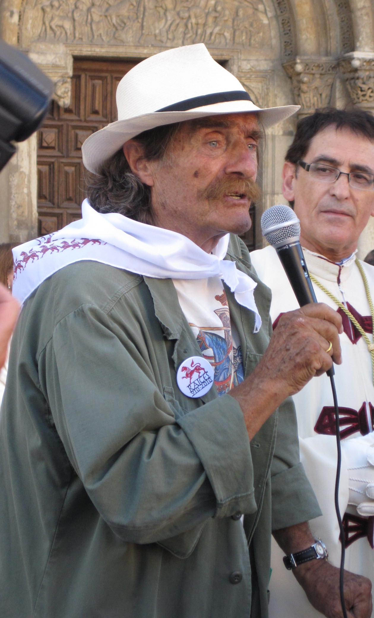 Miguel de la Quadra-Salcedo en León (España) durante la Ruta Quetzal 2010.